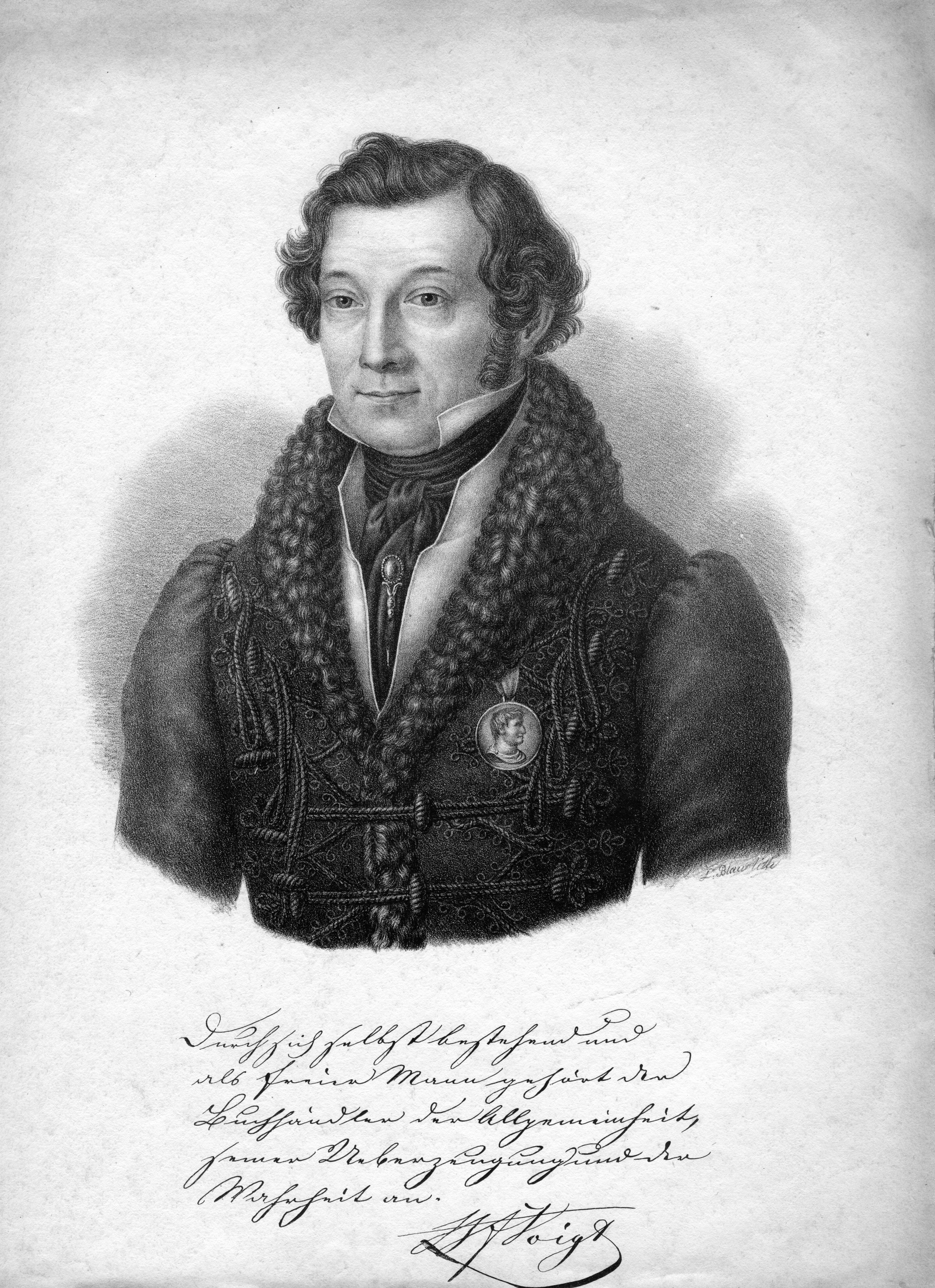 portrait gravé